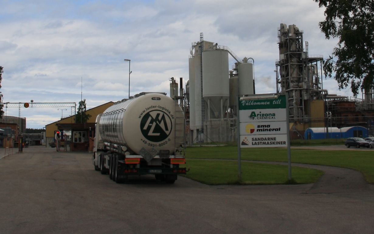 LKW-Einfahrt Industriepark Arizona Chemicals in Sandarne